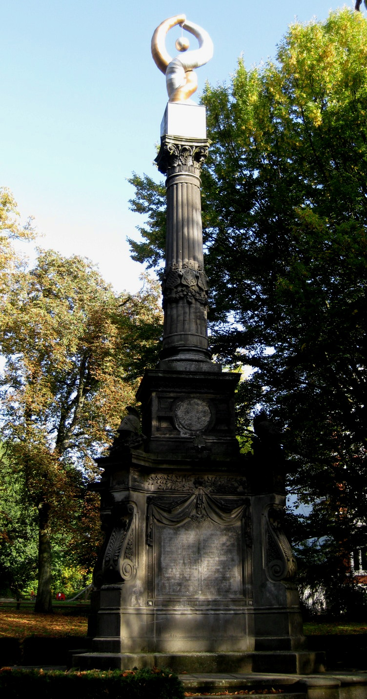 Ehrenmal auf dem Straßburger Platz, 1880 nach dem Entwurf von Emil Hackländer (1830-1902) auf dem Neumarkt errichtet und 1928 auf den Straßburger Platz versetzt. Die ursprüngliche Skulptur der Germania wurde im Zweiten Weltkrieg eingeschmolzen und nach 2000 durch die Skulptur „Die schützende Torsion“ ersetzt. Die Skulptur wurde nach einem Entwurf von Schülerinnen des Osnabrücker Ratsgymnasiums angefertigt.